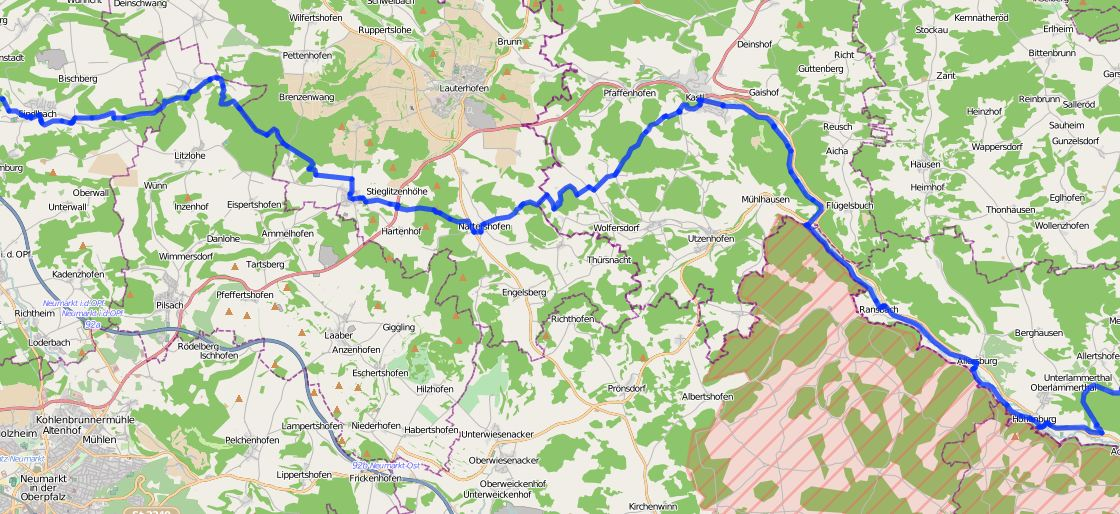 Jakobsweg von Hohenburg nach Sindlbach © OpenStreetMap contributors